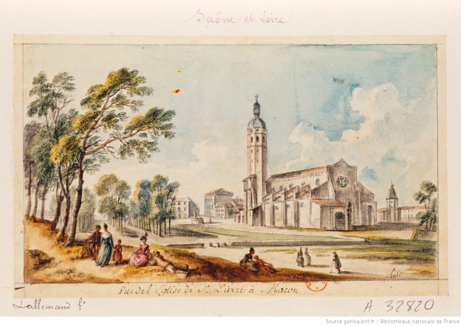 Vue de l'Eglise de Saint Pierre à Mâcon ; dessin à la plume et encre de Chine, aquarelle ; 9,6 x 16,3 cm ; de Lallemand, Jean-Baptiste (1716?-1803?).